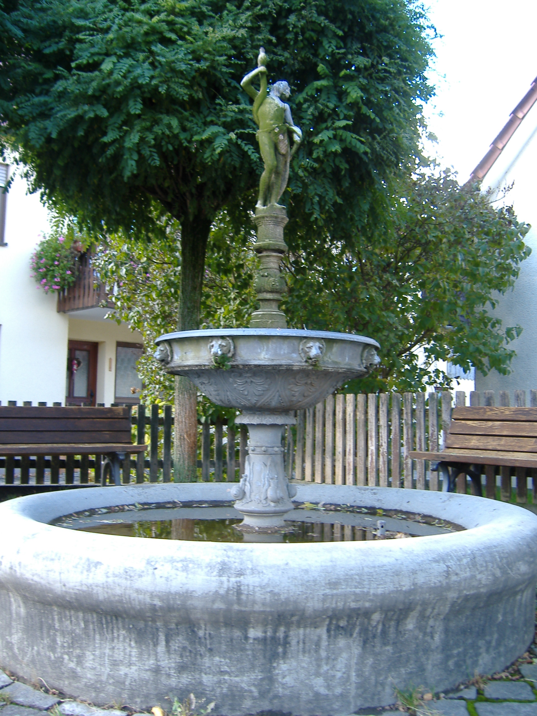 Binswangen